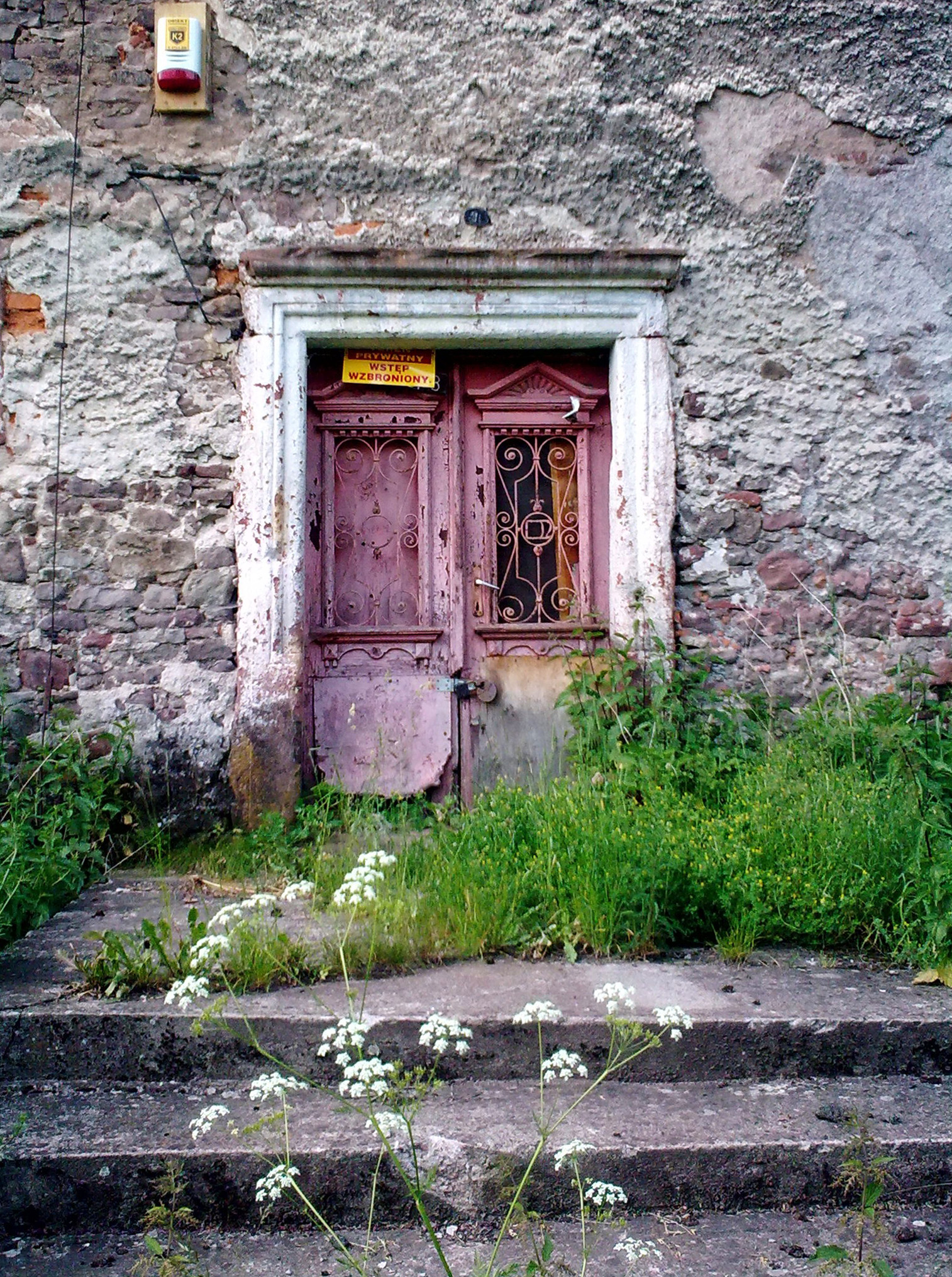 Włodowice, dwór